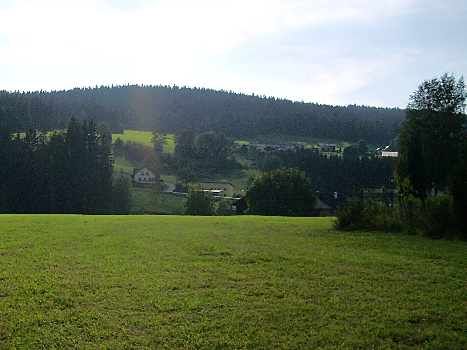 Viehberg v Novohradských horách ze Sandlu